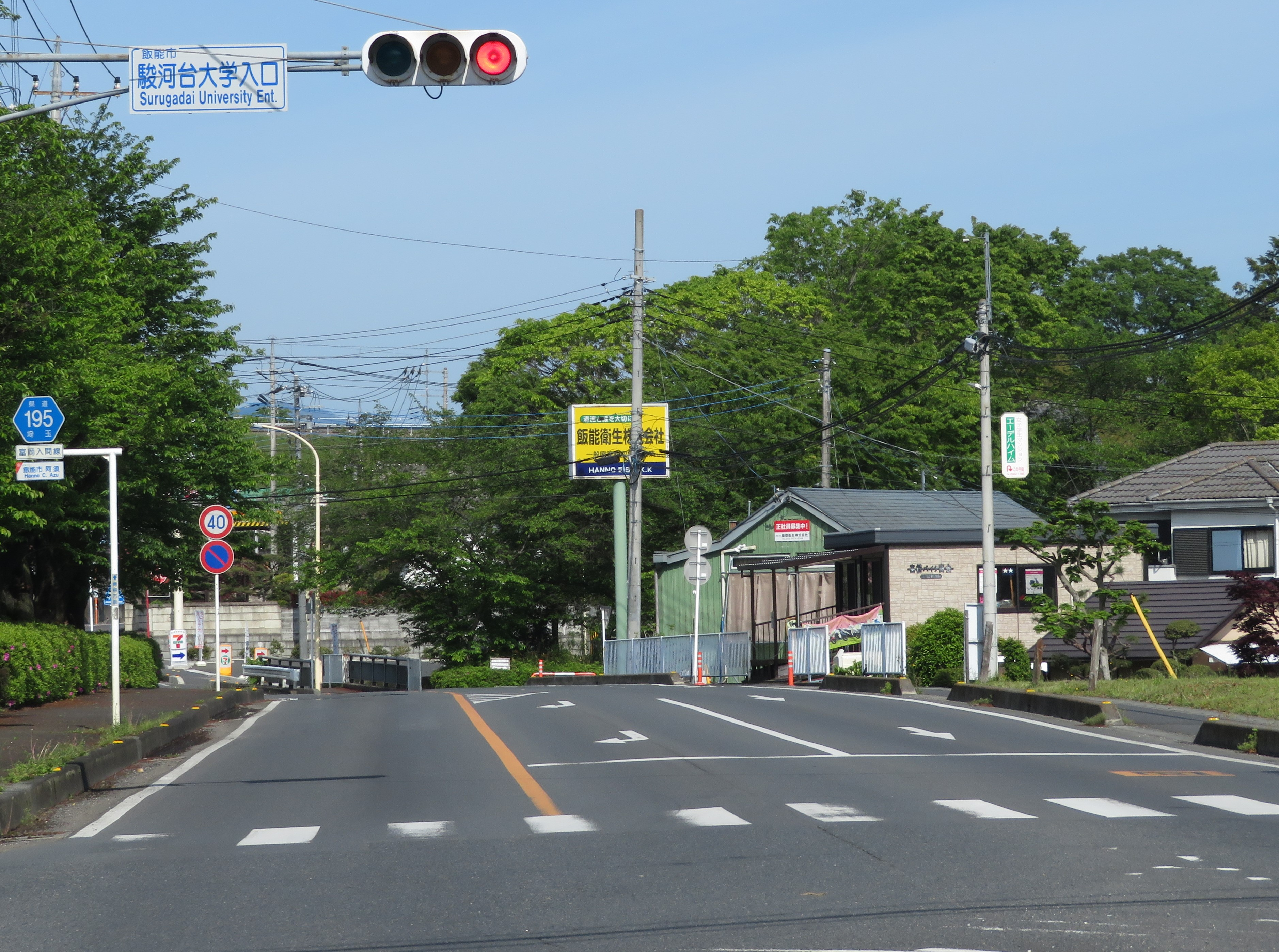 埼玉県道195号線飯能市阿須付近（青梅方面を撮影） Canon PowerShot SX720 HS